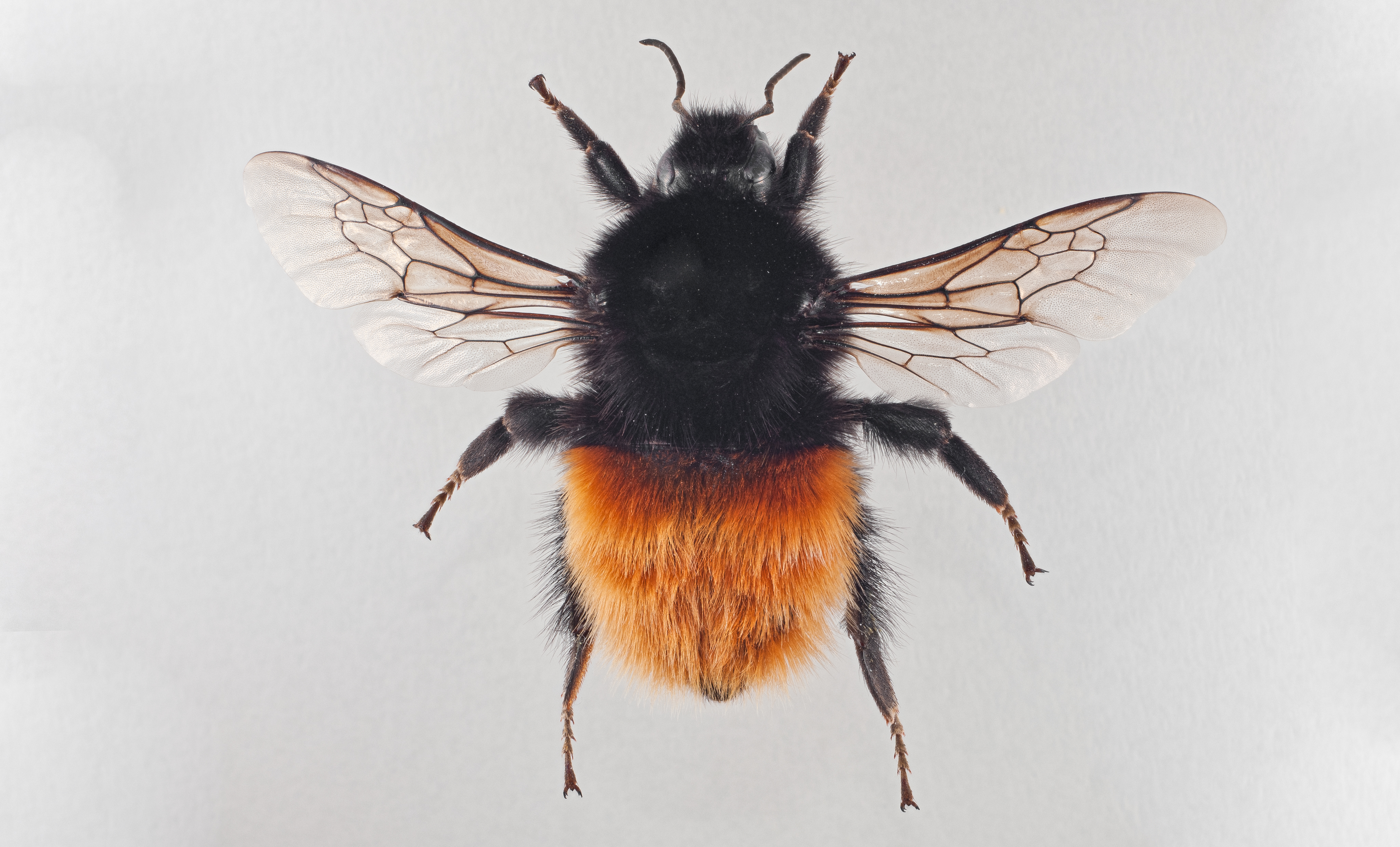 Alpehumle (Bombus alpinus)